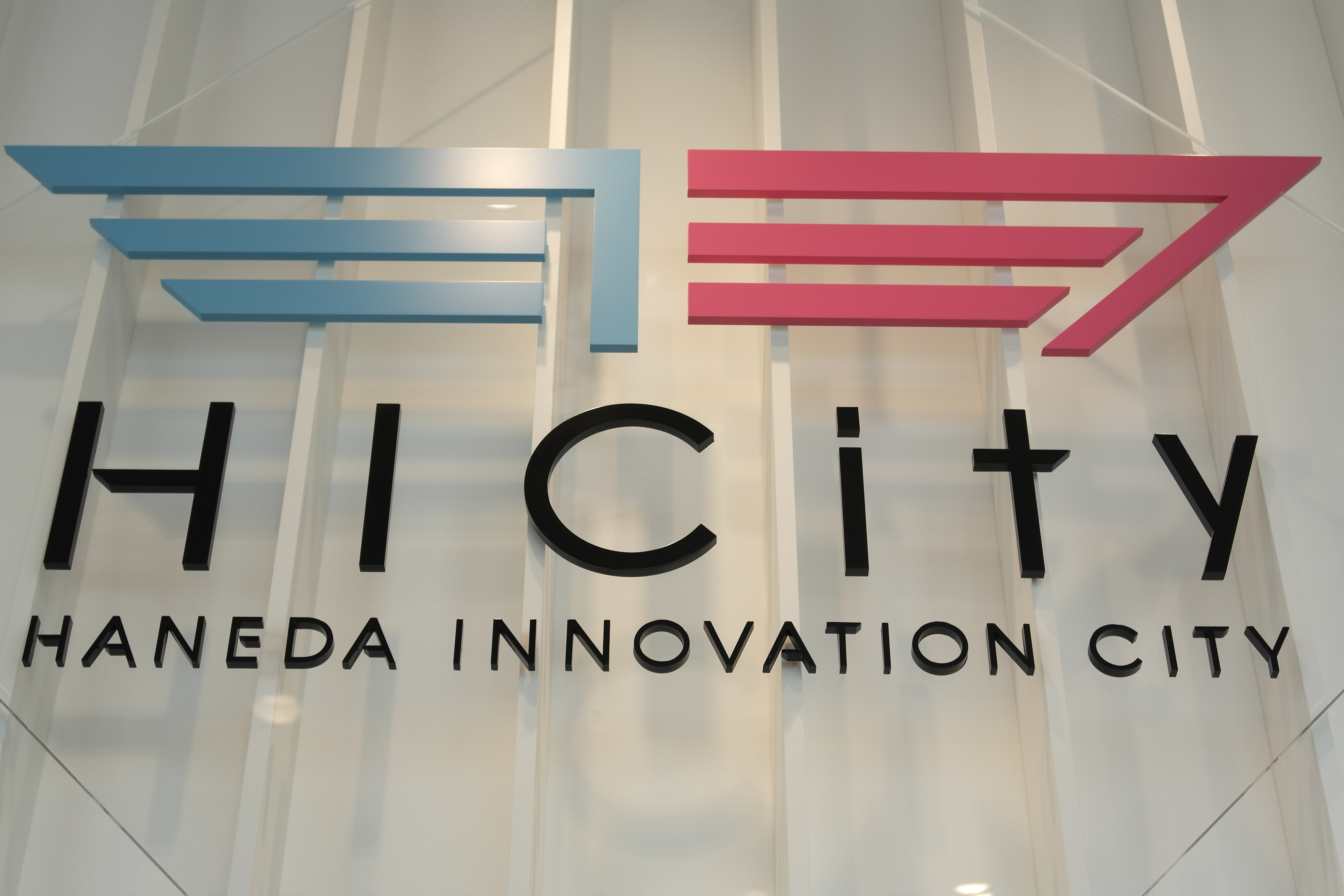 2020年7月3日に開業したHANEDA INNOVATION CITY（東京都大田区羽田空港１）のロゴ看板